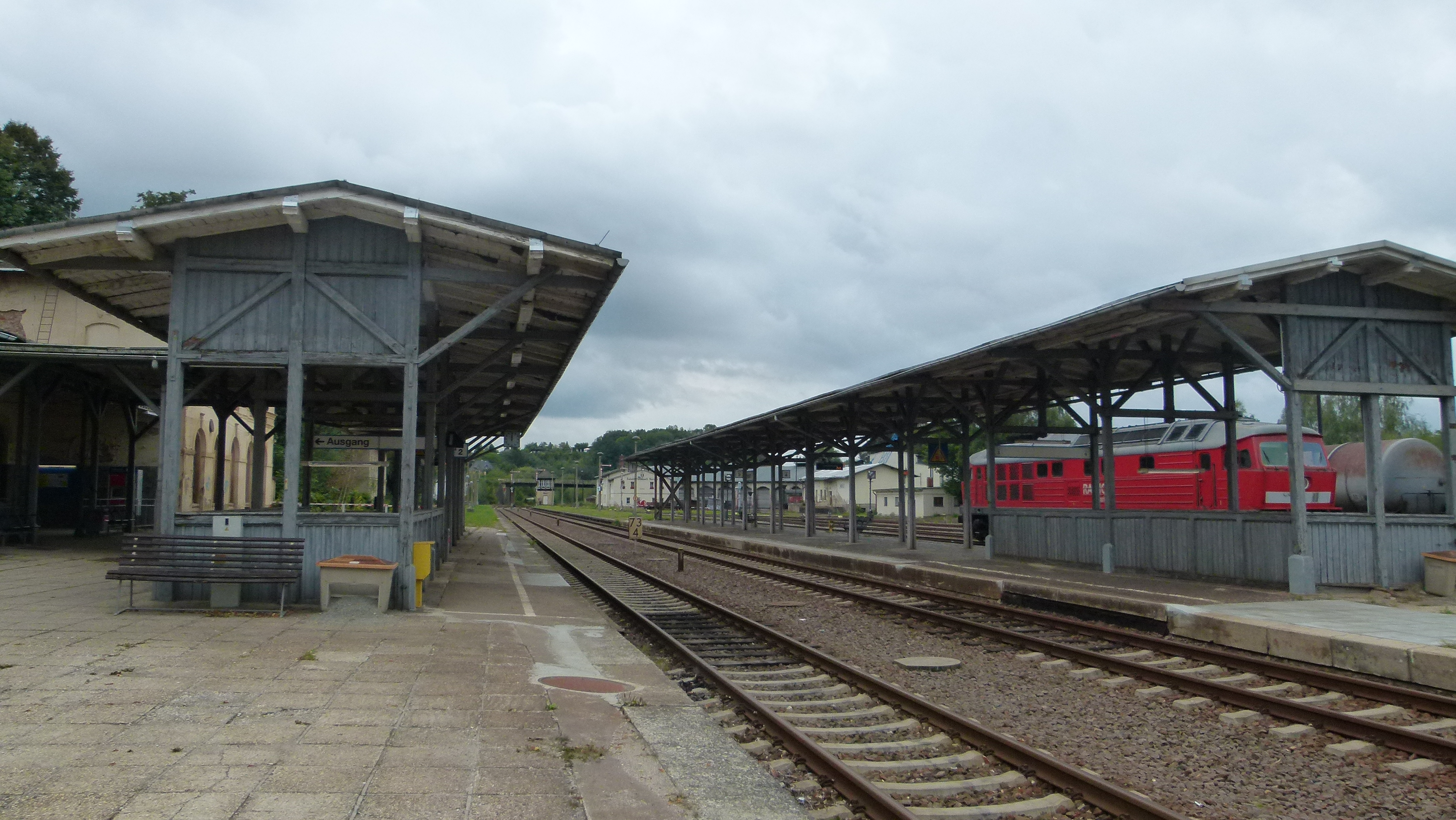 Denkmalgeschützter Bahnhof Nossen, Sachsen